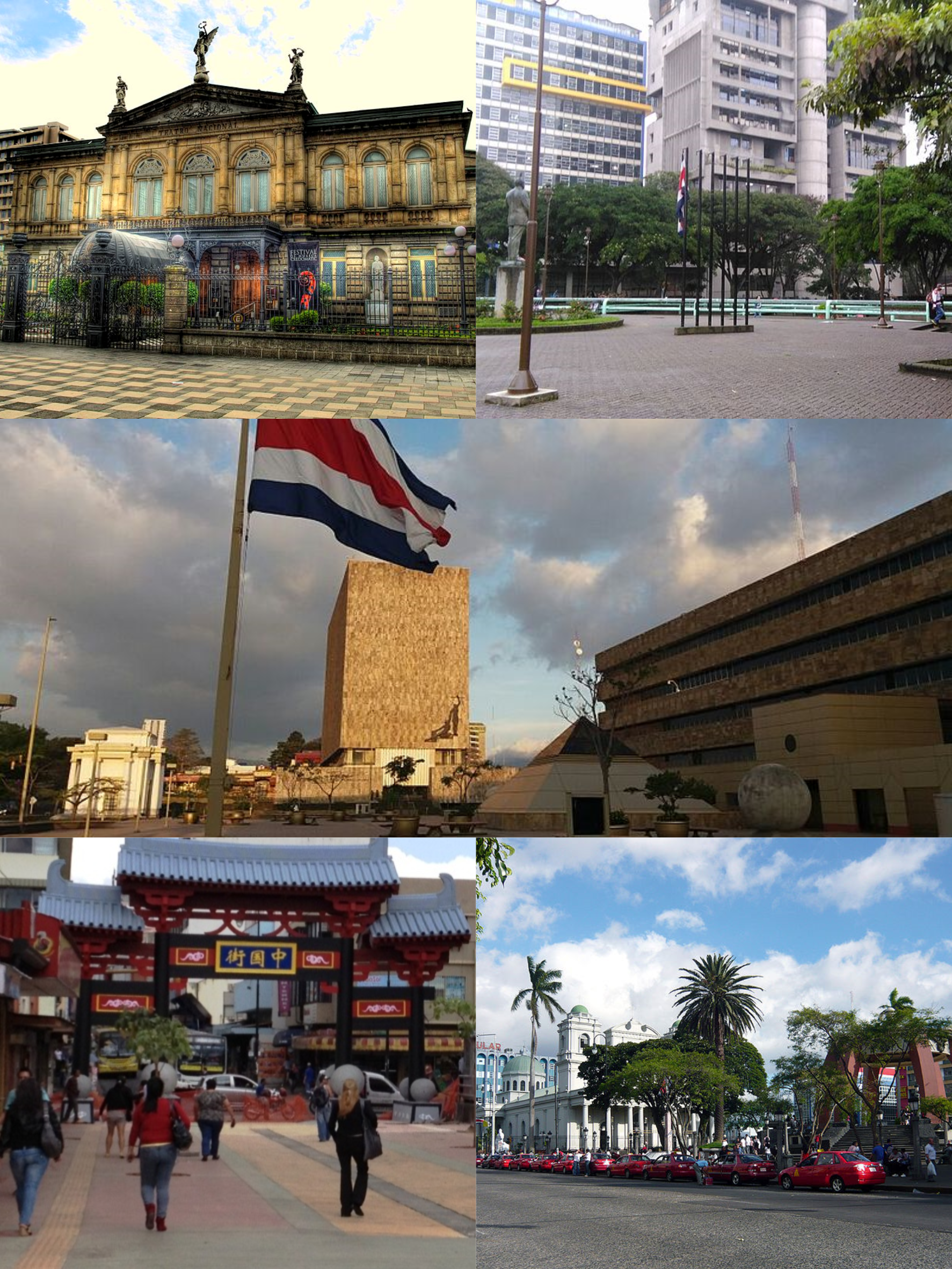 Fotomontaje del distrito Catedral de la ciudad de San José